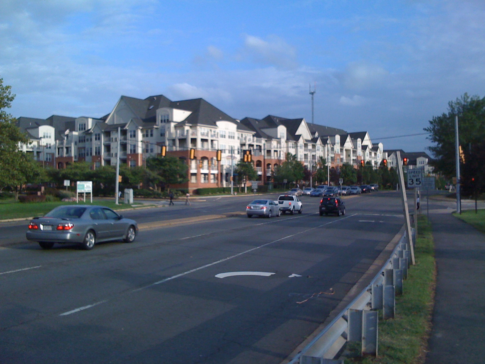 Merrifield, VA, USA